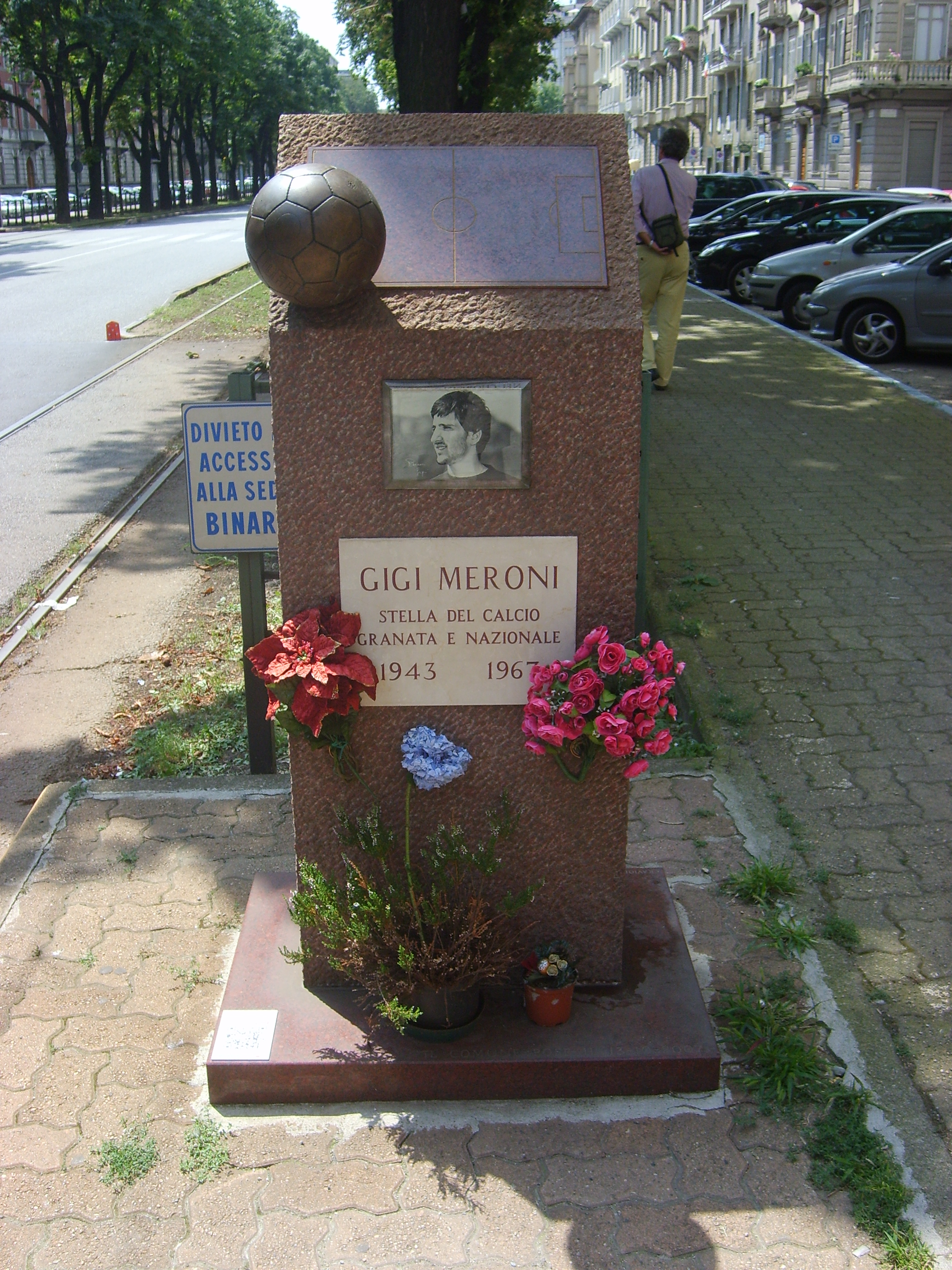 Monumento a Gigi Meroni - Torino, Corso Re Umberto 46 (eretto nel 2007)